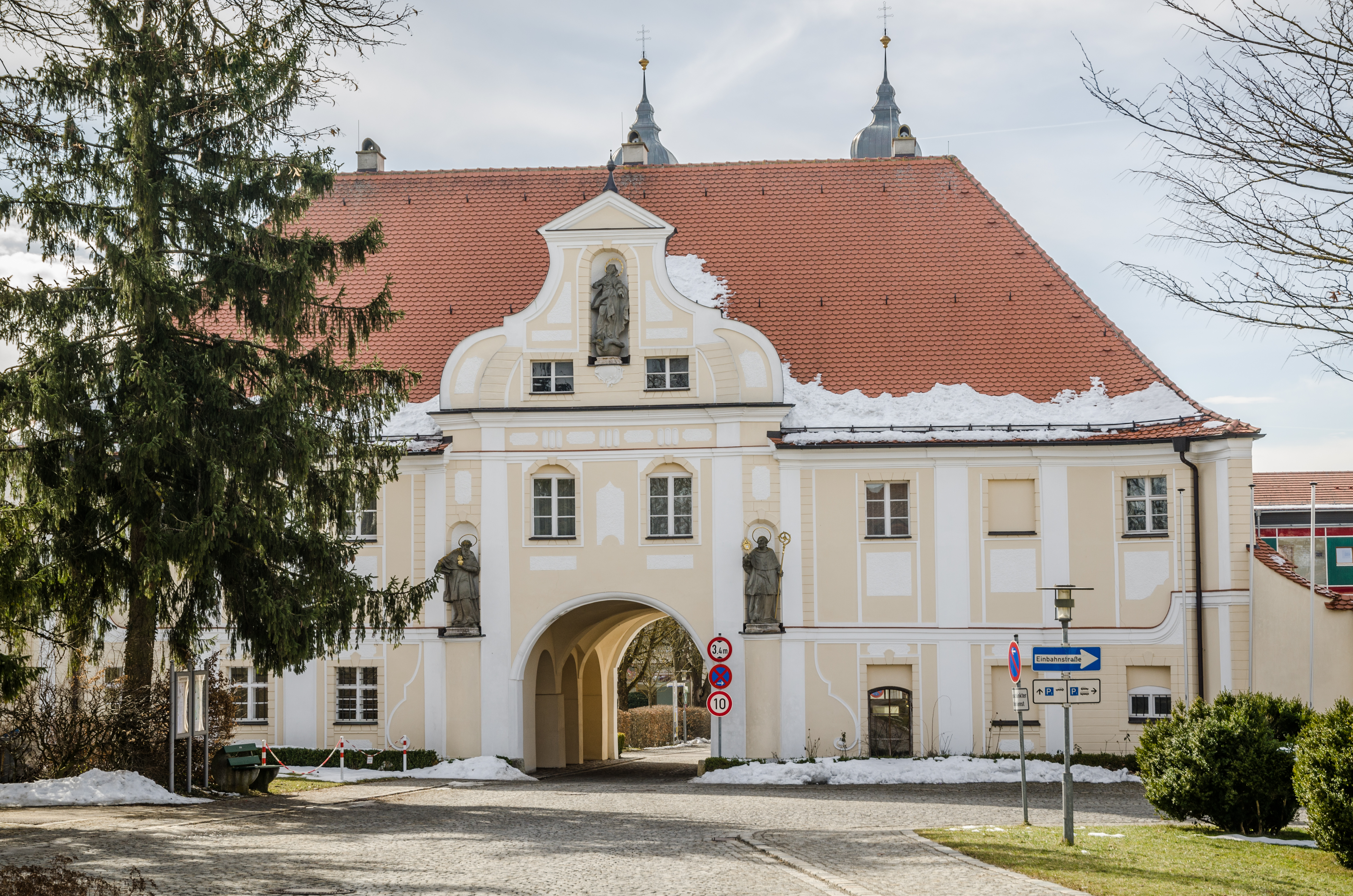 Roggenburg, Klosterstraße 1